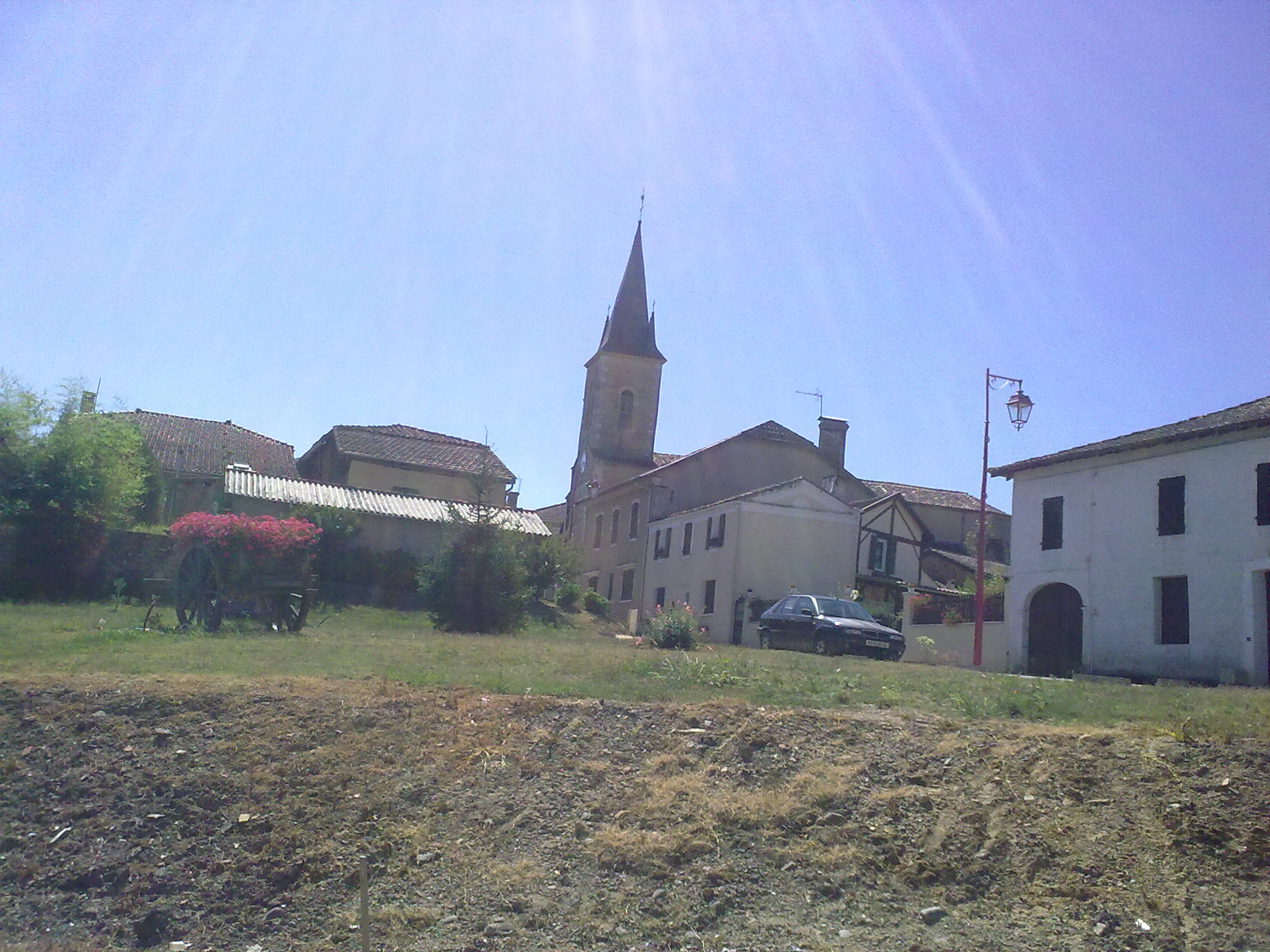 Momuy le 18 juillet 2010, France.